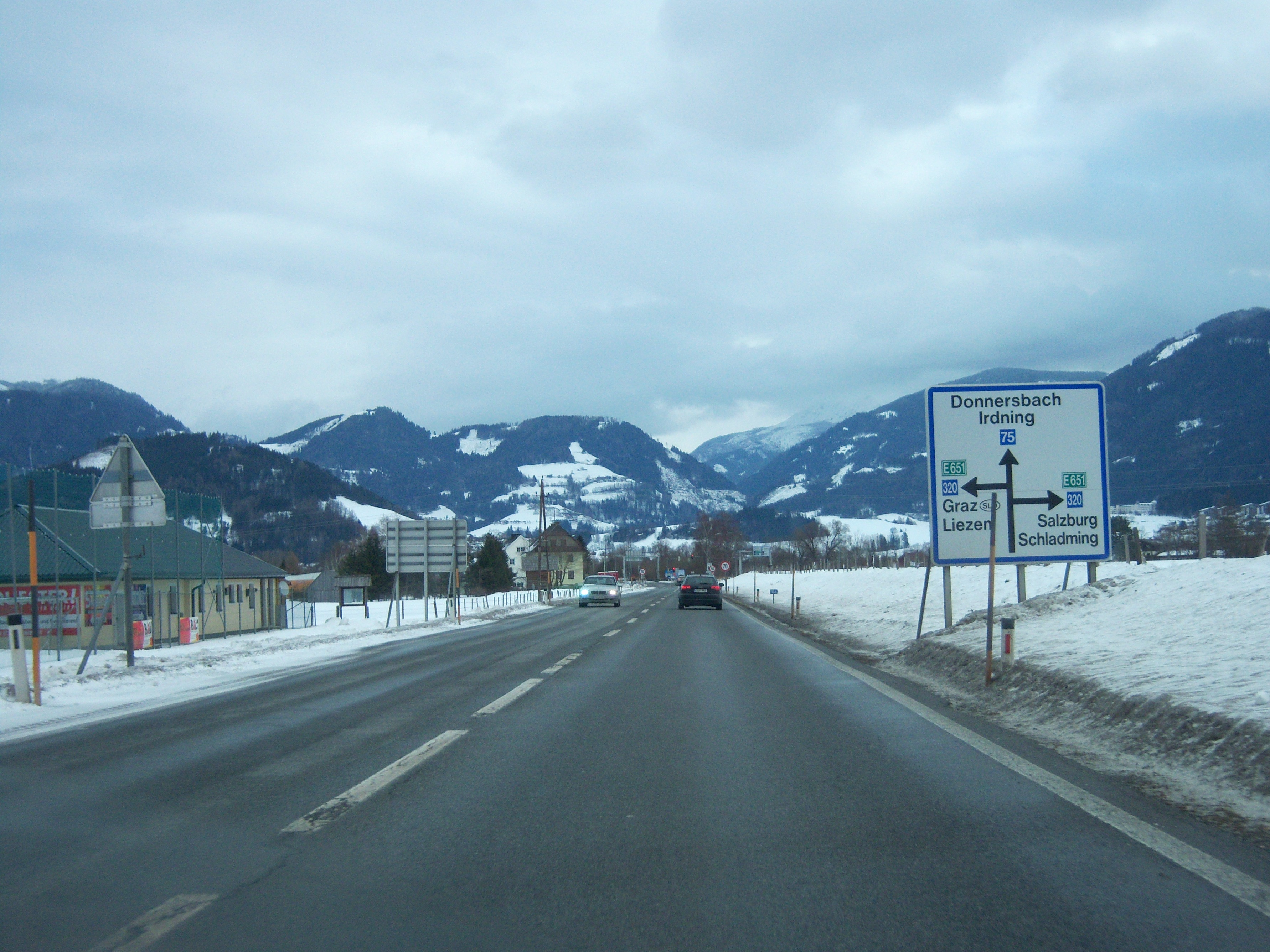 Ende der Salzkammergut Straße B145 bei Trautenfels: Kreuzung mit der Ennstal Straße B320 und Glattjoch Straße B75